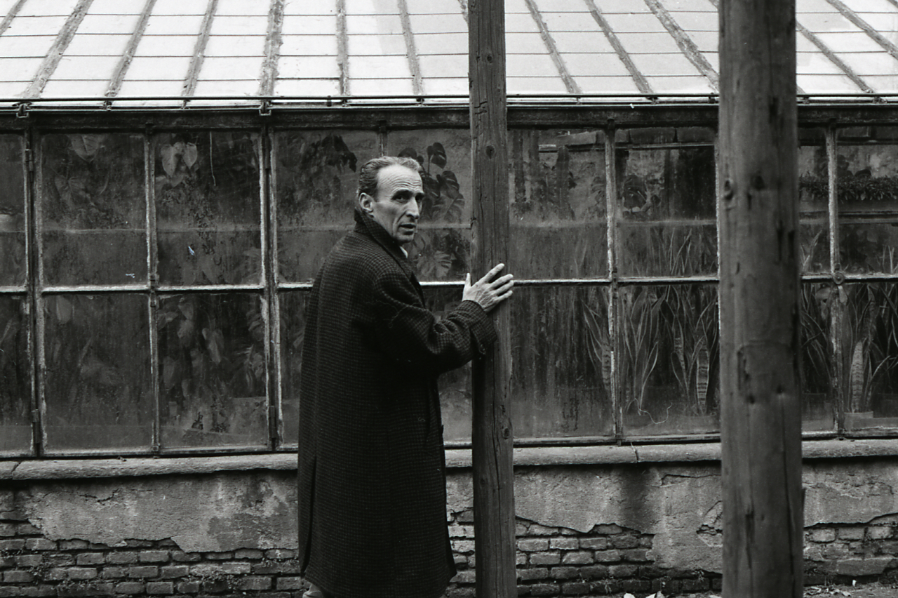 Serie fotografica : Milano, 1970 / Paolo Monti. - Strisce: 1, Fotogrammi complessivi: 4 : Negativo b/n, gelatina bromuro d'argento/ pellicola ; 35 mm. - ((I fotogrammi hanno una doppia numerazione. . - Sul portanegativi: Nikon FP4. - Sul dorso del portanegativi Monti specifica: "Corso Garibaldi 89". - potrebbe essere Luigi Broggini